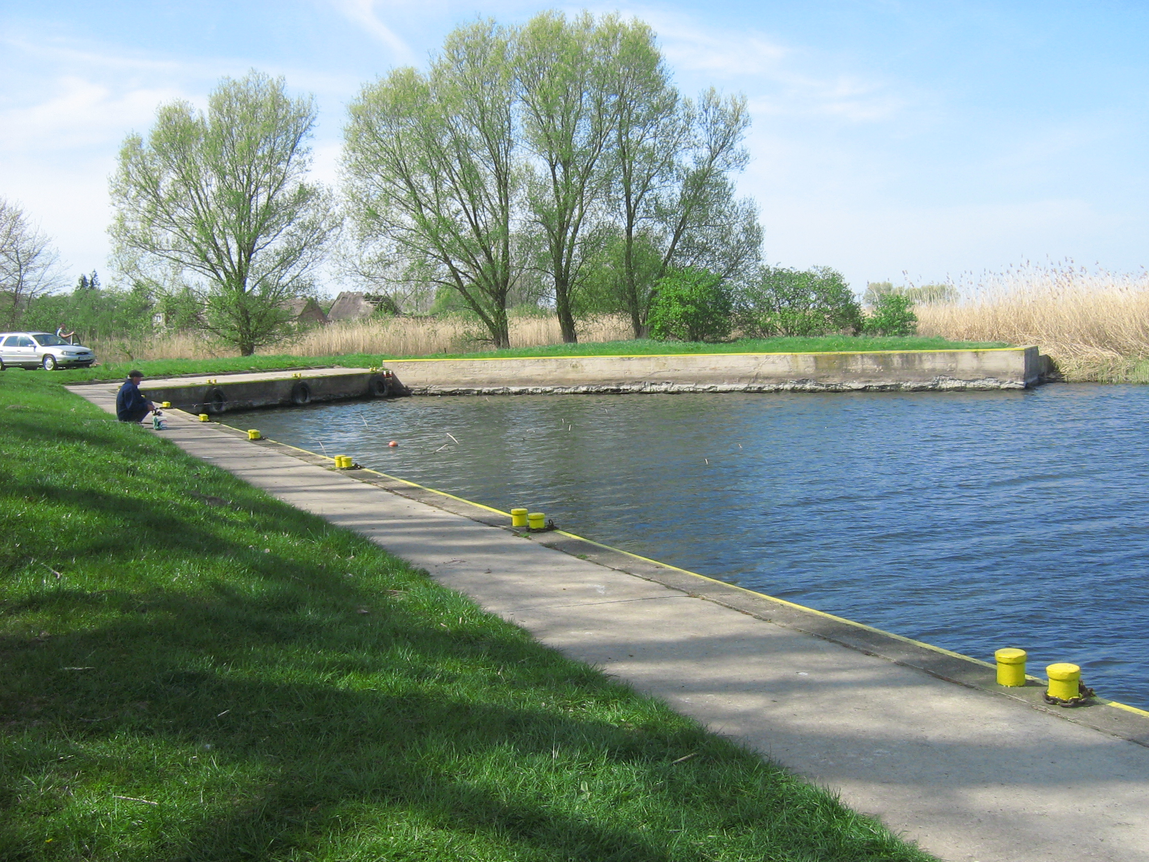 Nabrzeże wodne w Sierosławiu